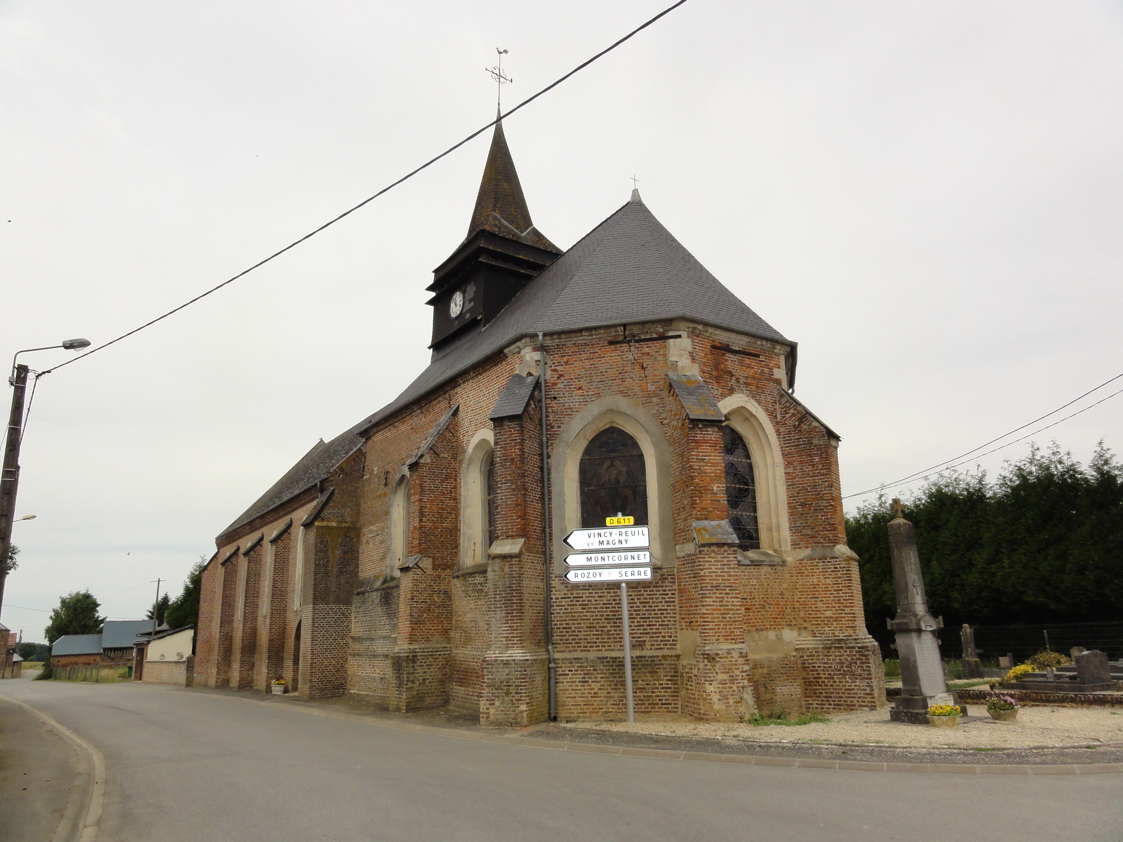 Soize (Aisne) église